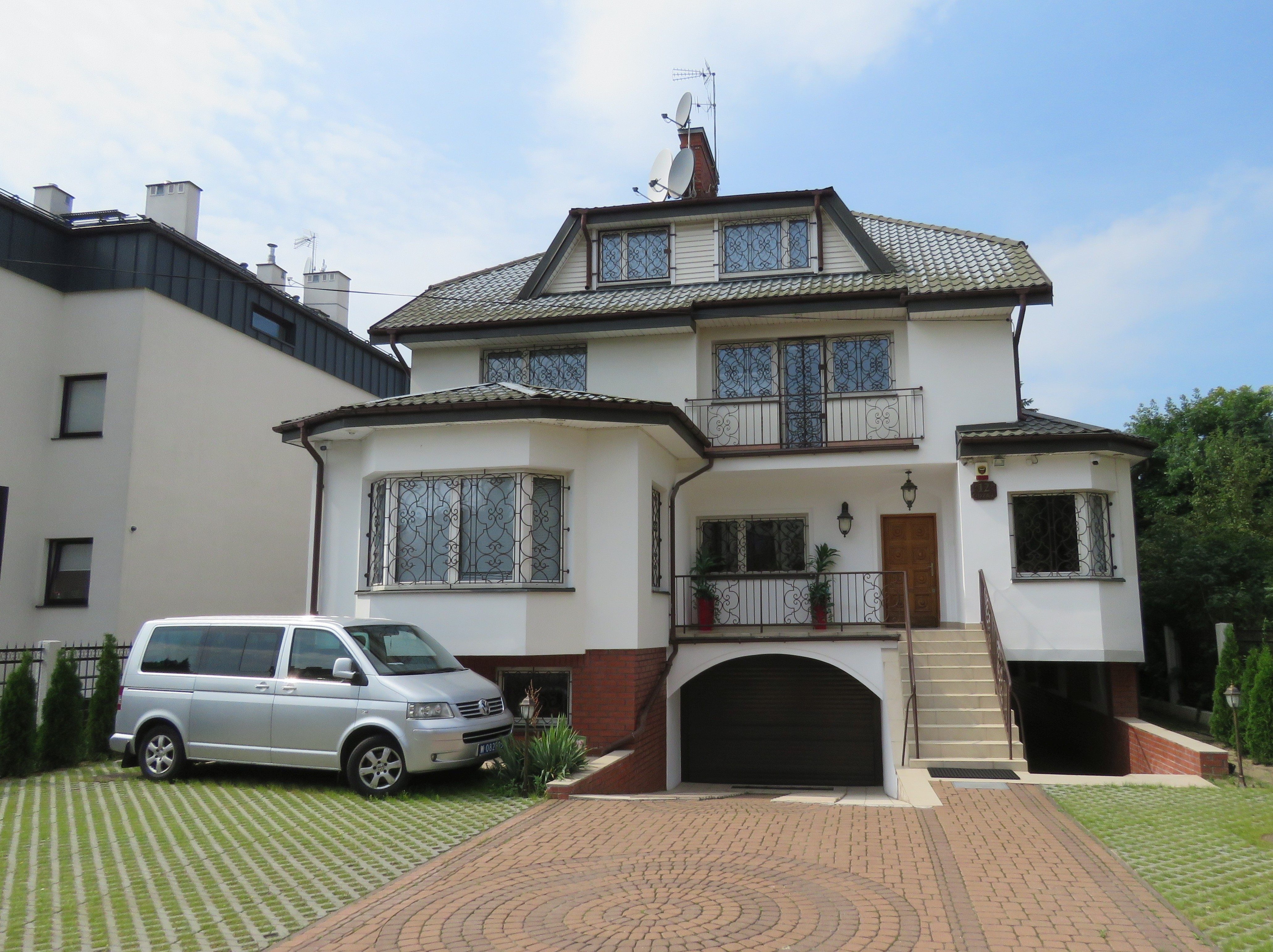 Ambasada Angoli w Polsce